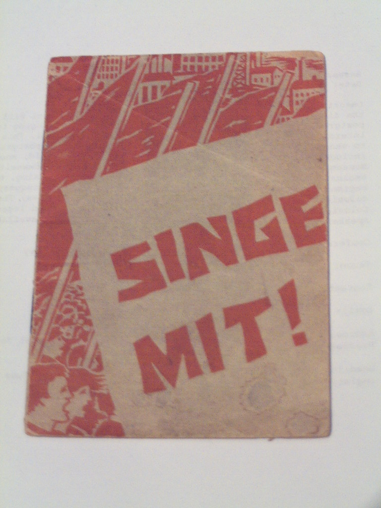 foto of a song book of the "Sozialdemokratische Partei Deutschlands" (SPD), Hamburg 1932/Foto eines Liederheftes der SPD Hamburg von 1932